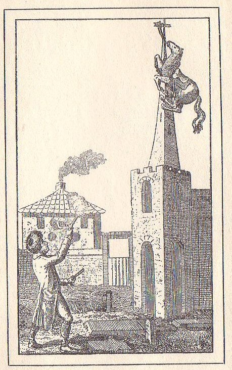 IB 7 Titelillustration, Bild von Franz Riepenhausen († 1831)